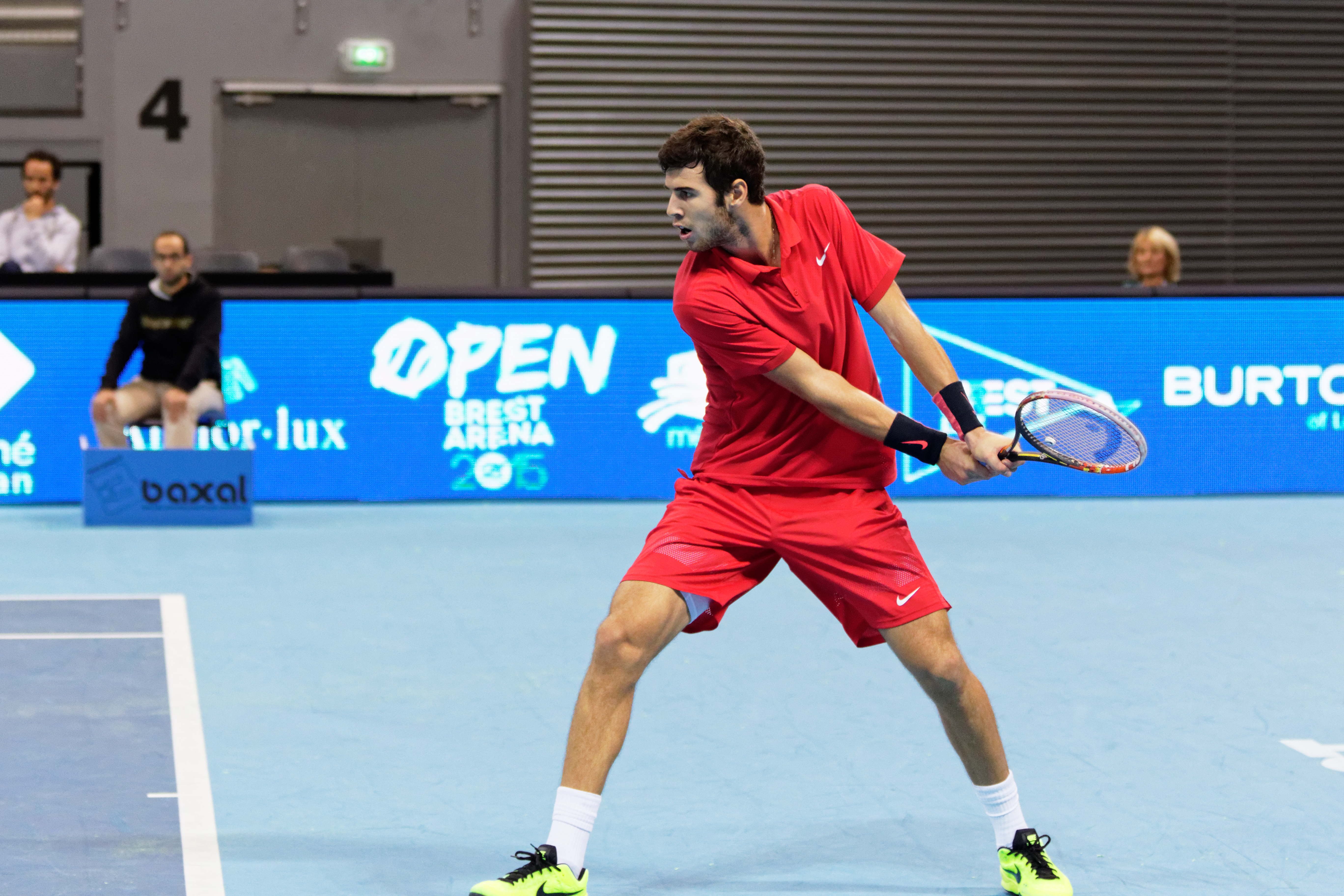 Rencontre entre Calvin Hemery et Karen Khachanov lors du huitième de final de l'Open de Brest Arena 2015. Karen Khachanov gagnera deux sets à un.